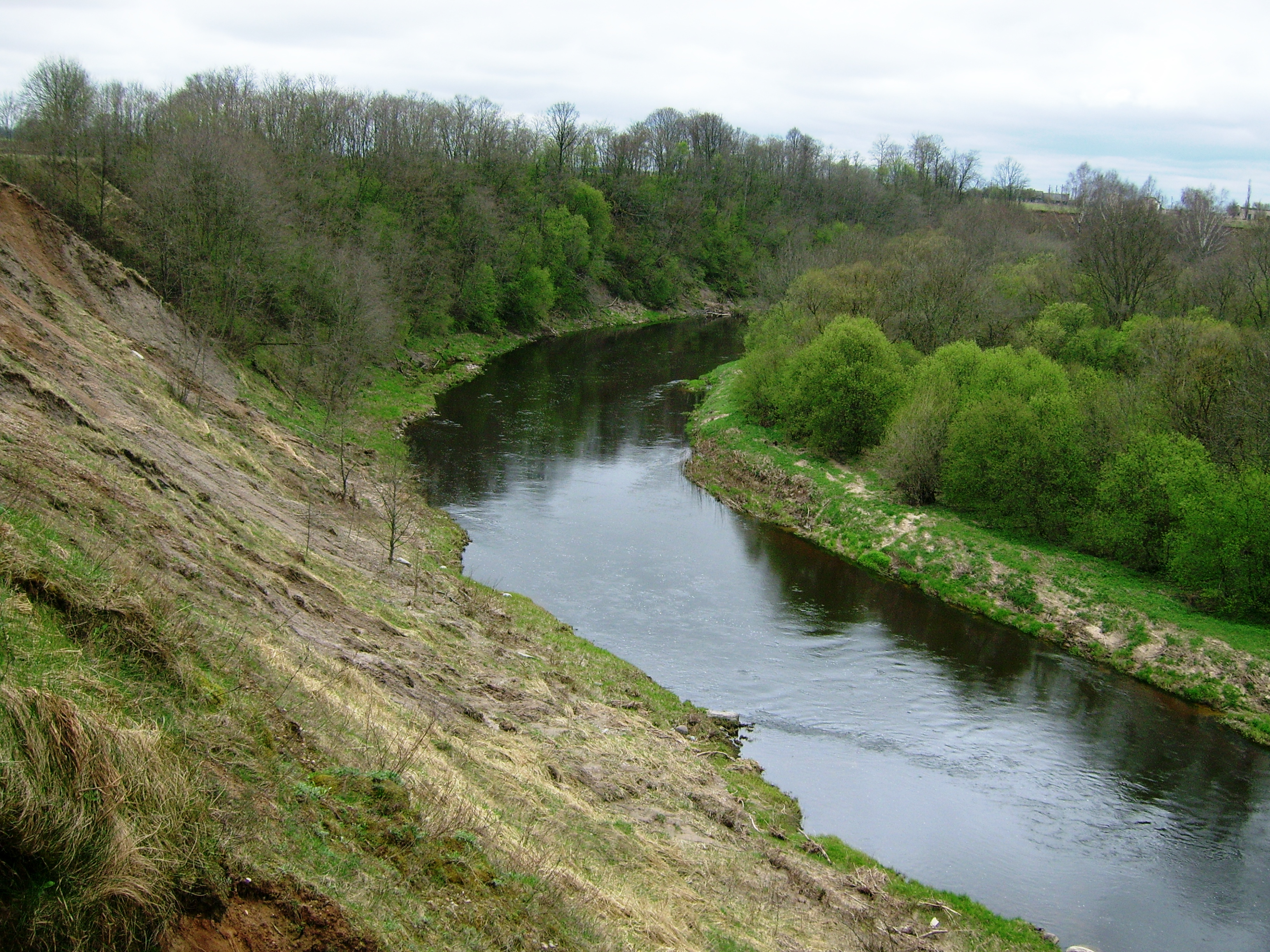 Jūros slėnis